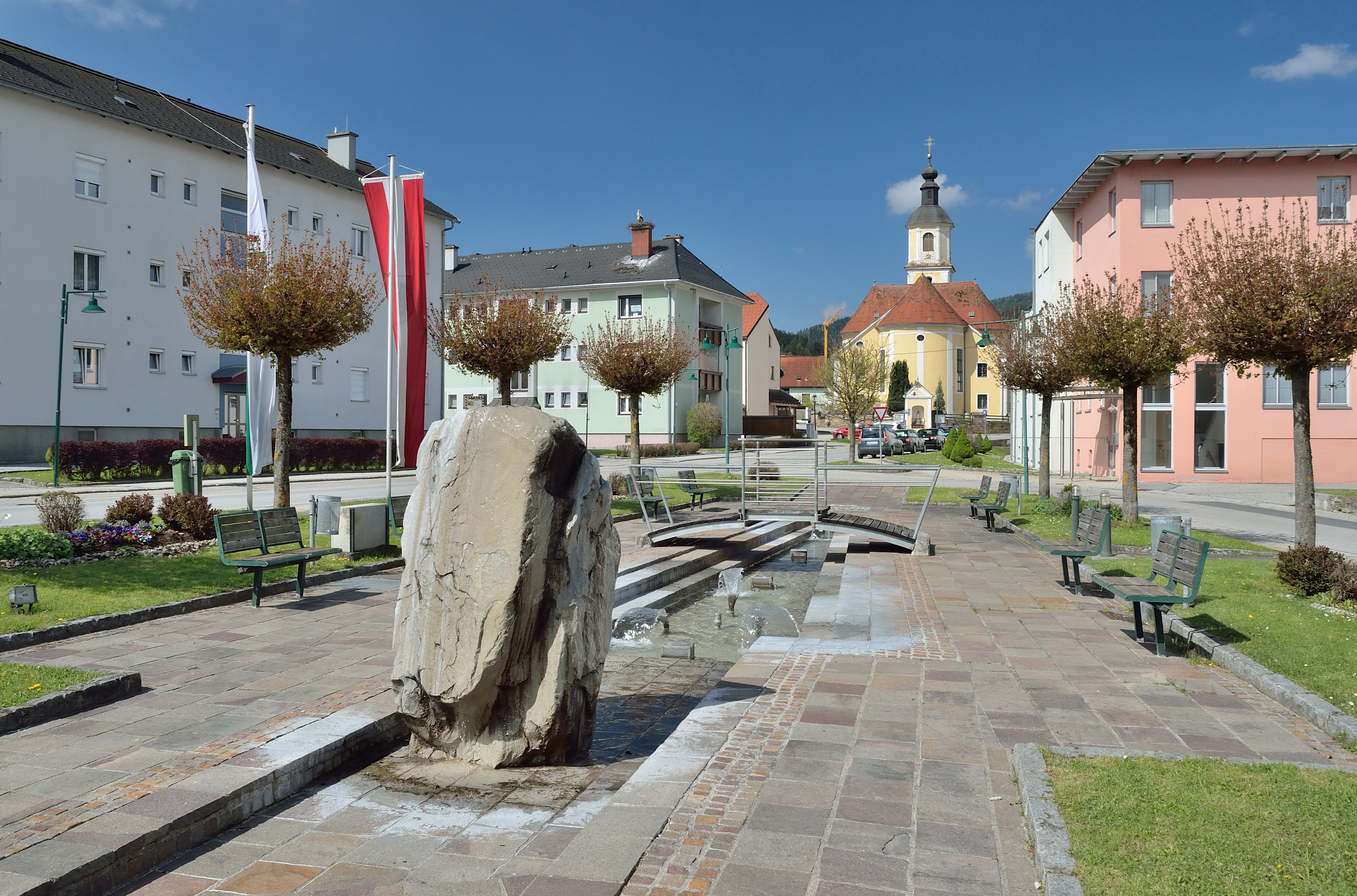 Der Dorfplatz (zwischen Dorfstraße und Parkstraße) in Wartberg im Mürztal. Blick zur Pfarrkirche.